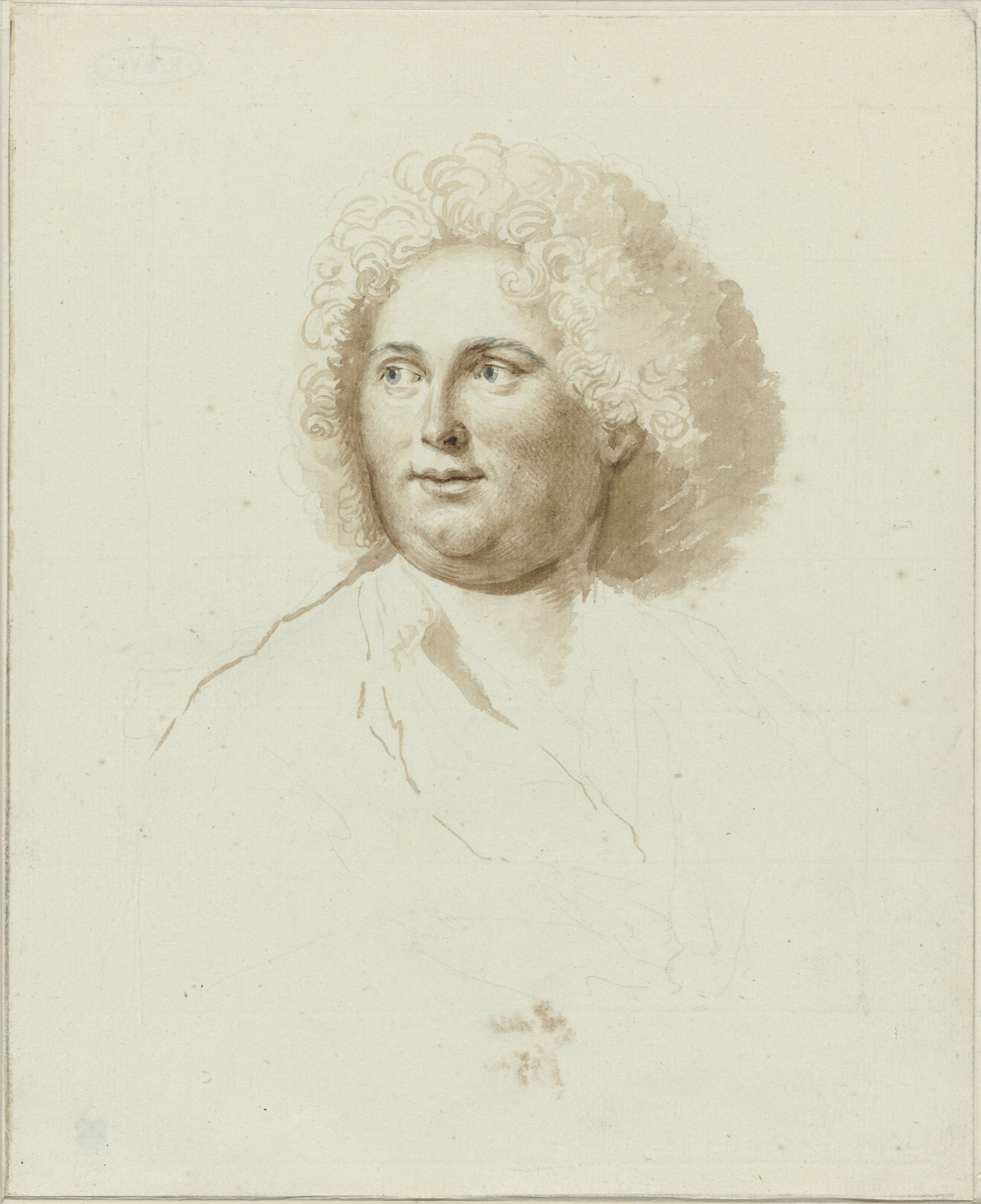 IdentificatieTitel(s): Portret van de schilder Dirk ValkenburgObjecttype: tekening Objectnummer: RP-T-1940-322VervaardigingVervaardiger: tekenaar: anoniemDatering: 1685 - ca. 1721Fysieke kenmerken: potlood, penseel in bruin en grijsMateriaal: papier potlood Techniek: penseelAfmetingen: h 199 mm × b 163 mmOnderwerpWat: portrait, self-portrait of artistportrait, self-portrait of painterhistorical person (VALKENBURG, Dirk) - historical person (VALKENBURG, Dirk) portrayed aloneWie: Dirk ValkenburgVerwerving en rechtenCredit line: Aankoop uit het F.G. Waller-FondsVerwerving: aankoop 1940Copyright: Publiek domein